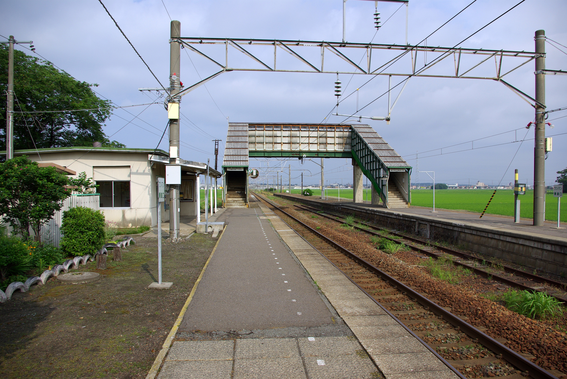 JR羽越本線東酒田駅